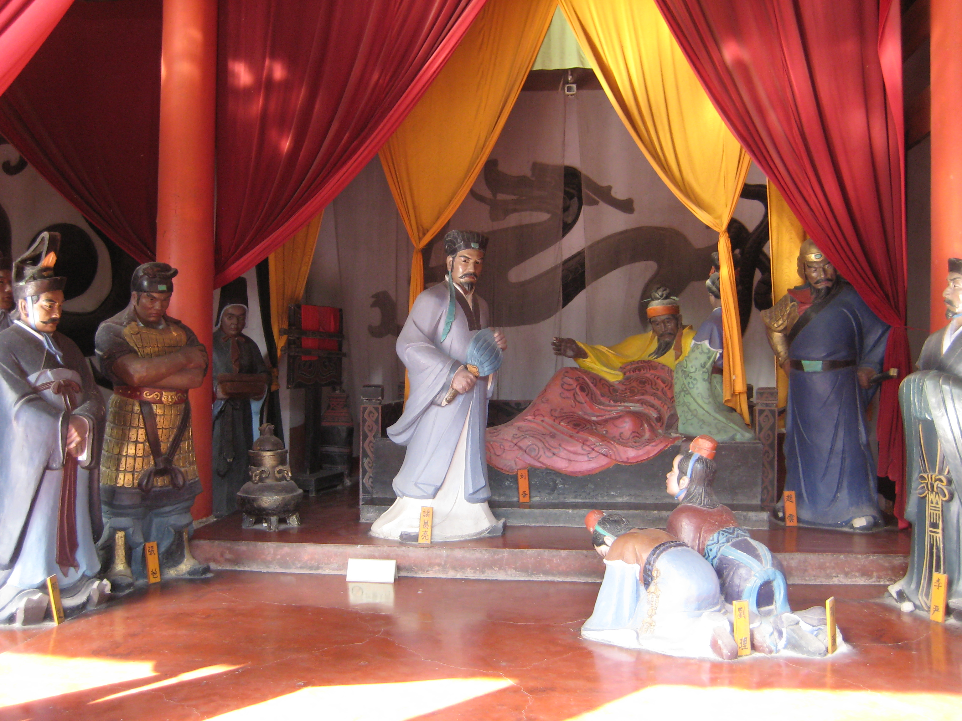 托孤堂